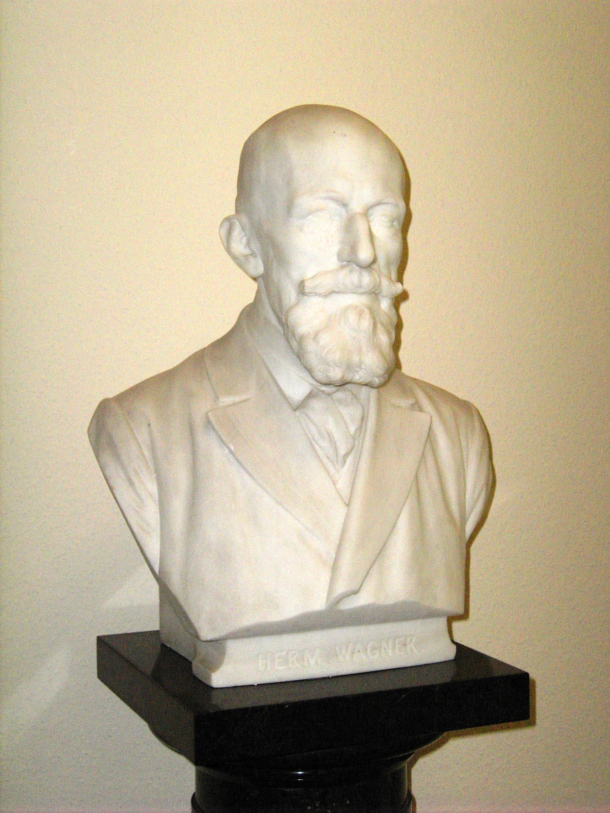 Büste des Geographen Hermann Wagner. Die Büste wurde 1910 von Adolf von Donndorf (1835-1916) zu Wagners 70. Geburtstag erschaffen. An deren Finanzierung war u. a. die Geographische Gesellschaft zu Lübeck beteiligt.